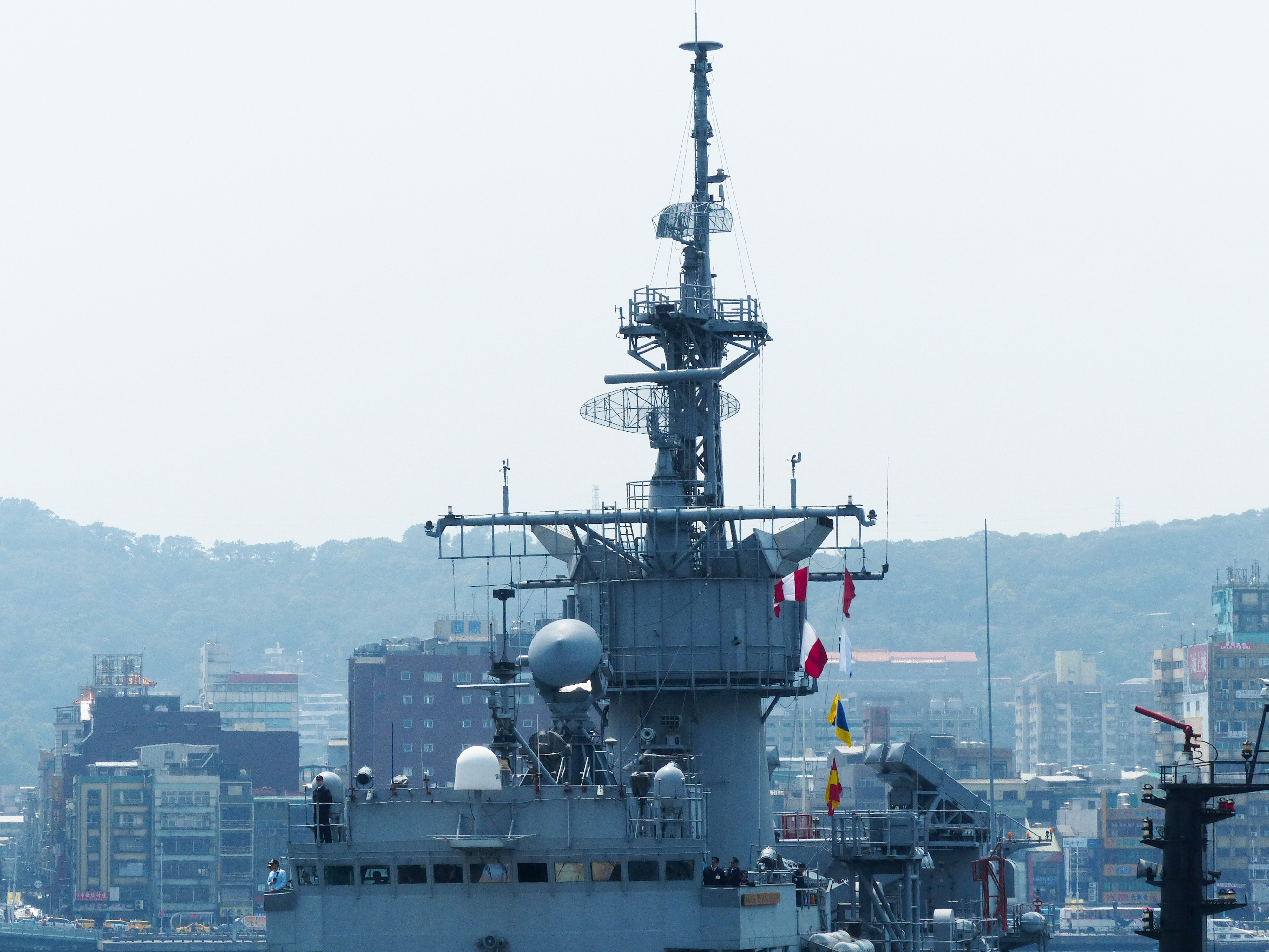 濟陽級巡防艦宜陽（FFG-939）艦橋頂部與主桅。